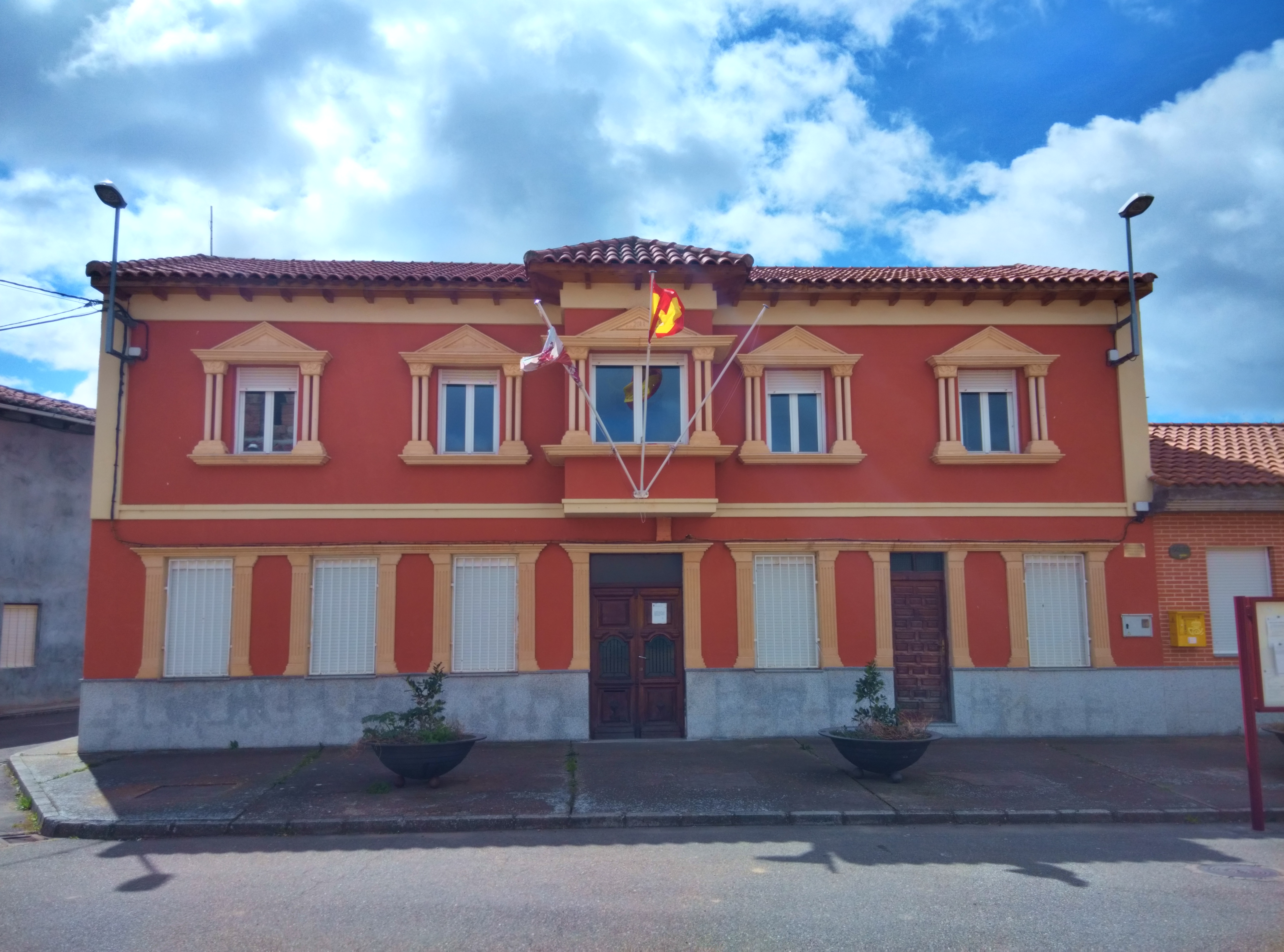 Ayuntamiento de Quintana del Marco (León, España).